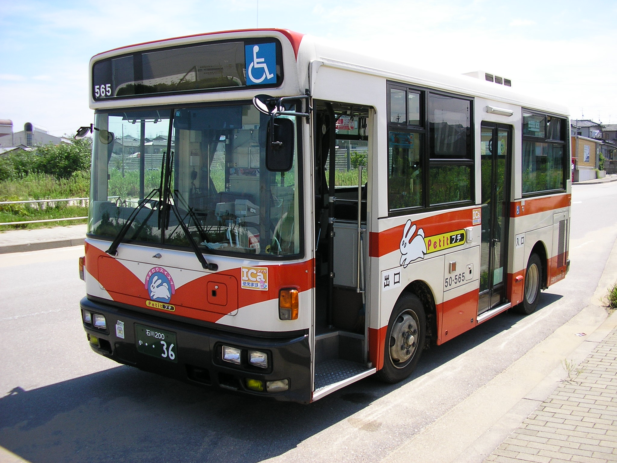 2006年7月撮影